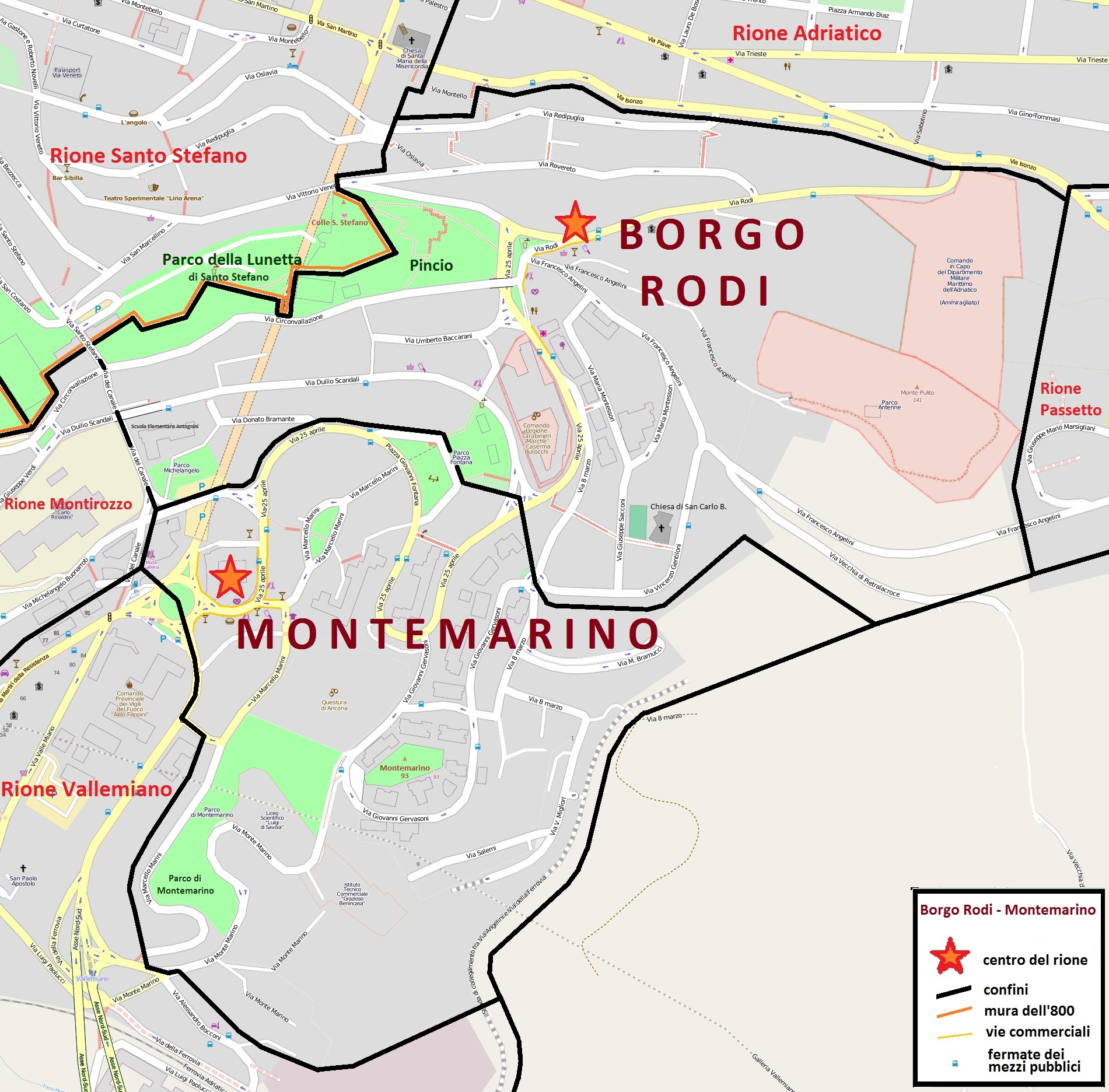 Mappa del Rione Borgo Rodi e del quartiere di Montemarino di Ancona, con i confini, le vie, le piazze e i parchi.